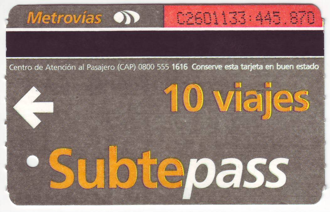 Tarjeta de 10 viajes